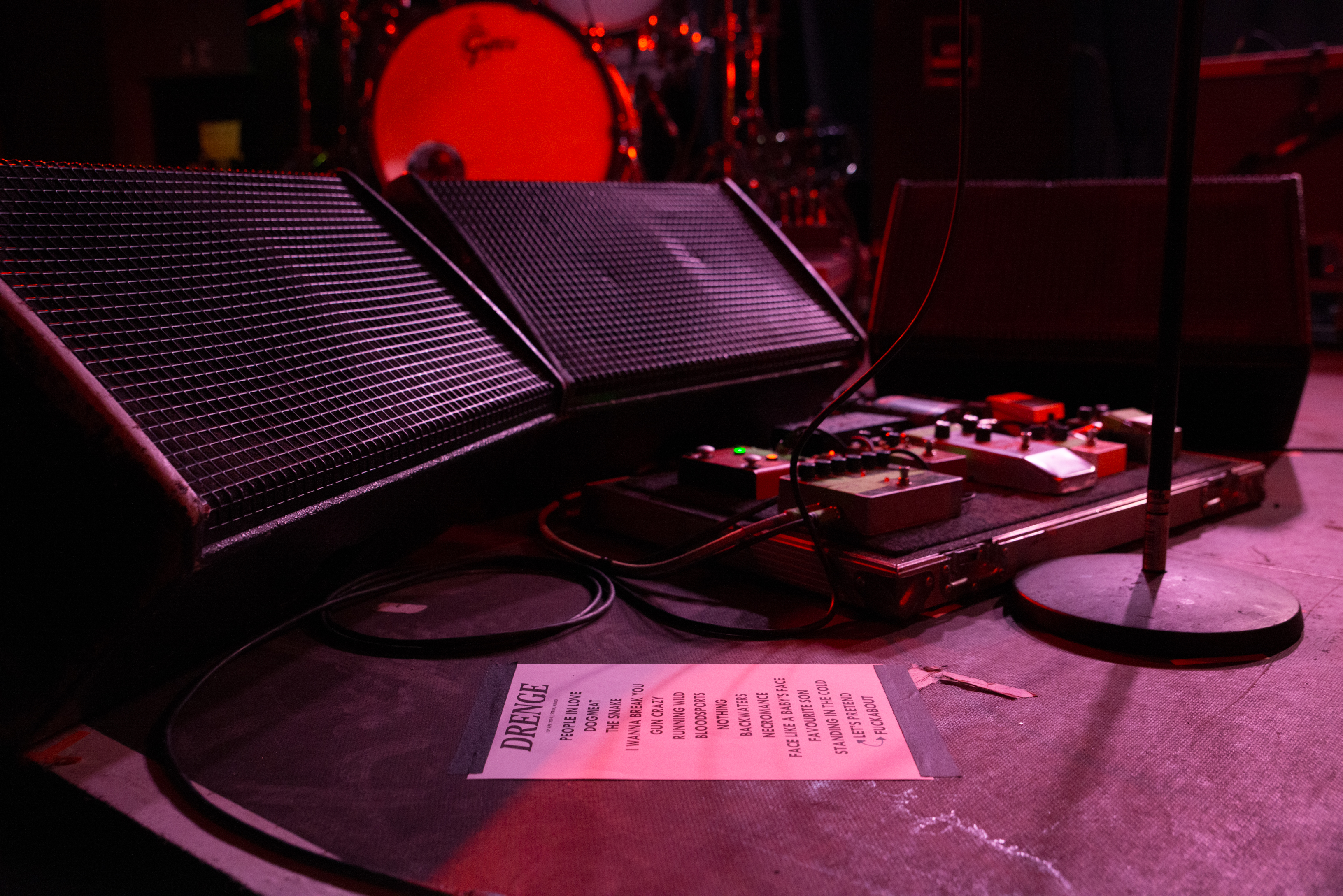 de Drenge 2014 Muenchen Strom